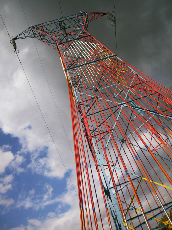 Art-pylon, landscape pylon, "Source - Energie Pylône en oeuvre d'art